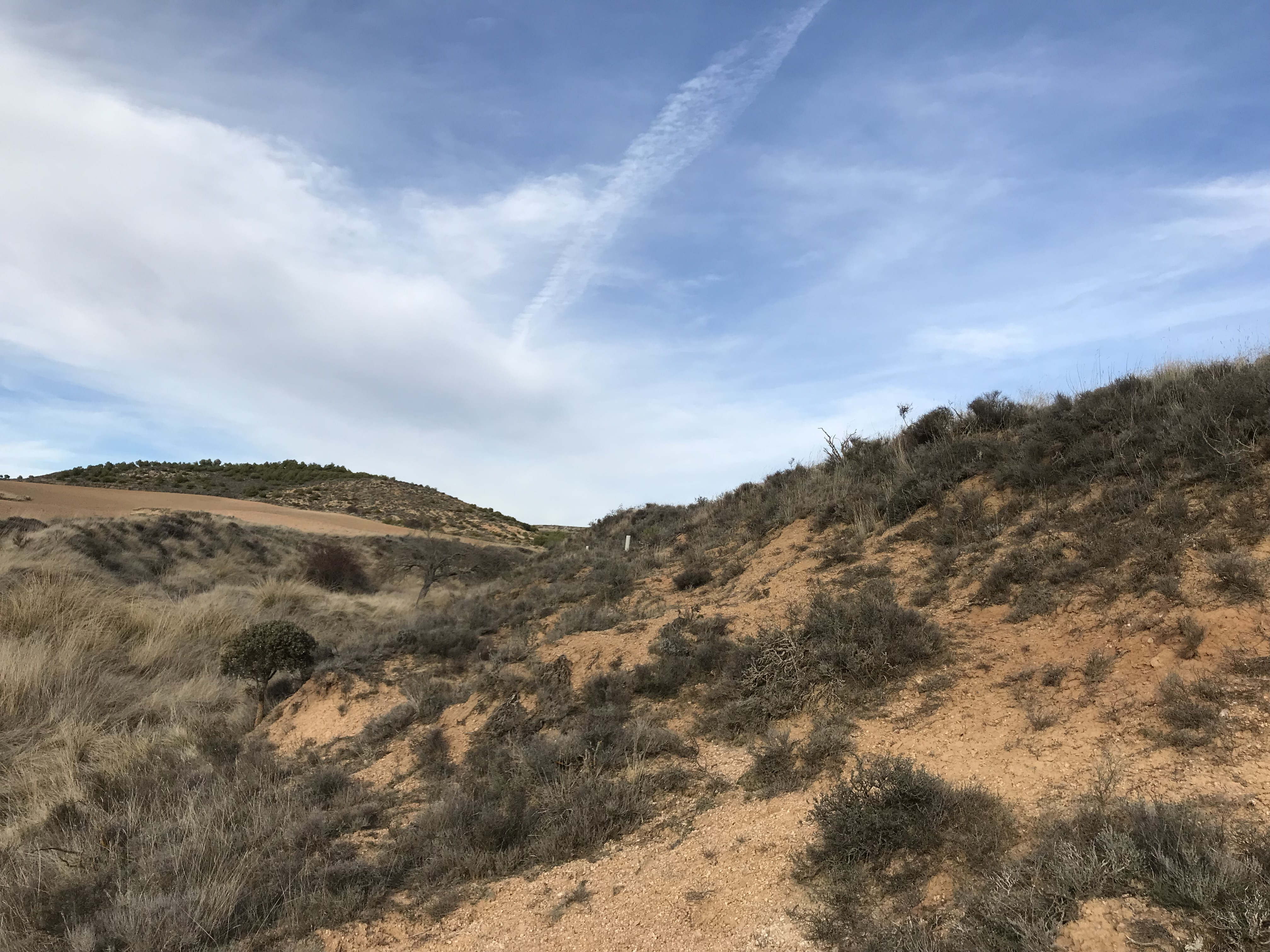 Zona denominada del "Barranco Hondo" de Villalba (Soria) en el que se encontró la denominada placa paleolítica de Villalba. Visita de trabajo de investigación del grupo de Patrimonio Cultural y Artístico Soriano del Cepa Celtiberia de Soria